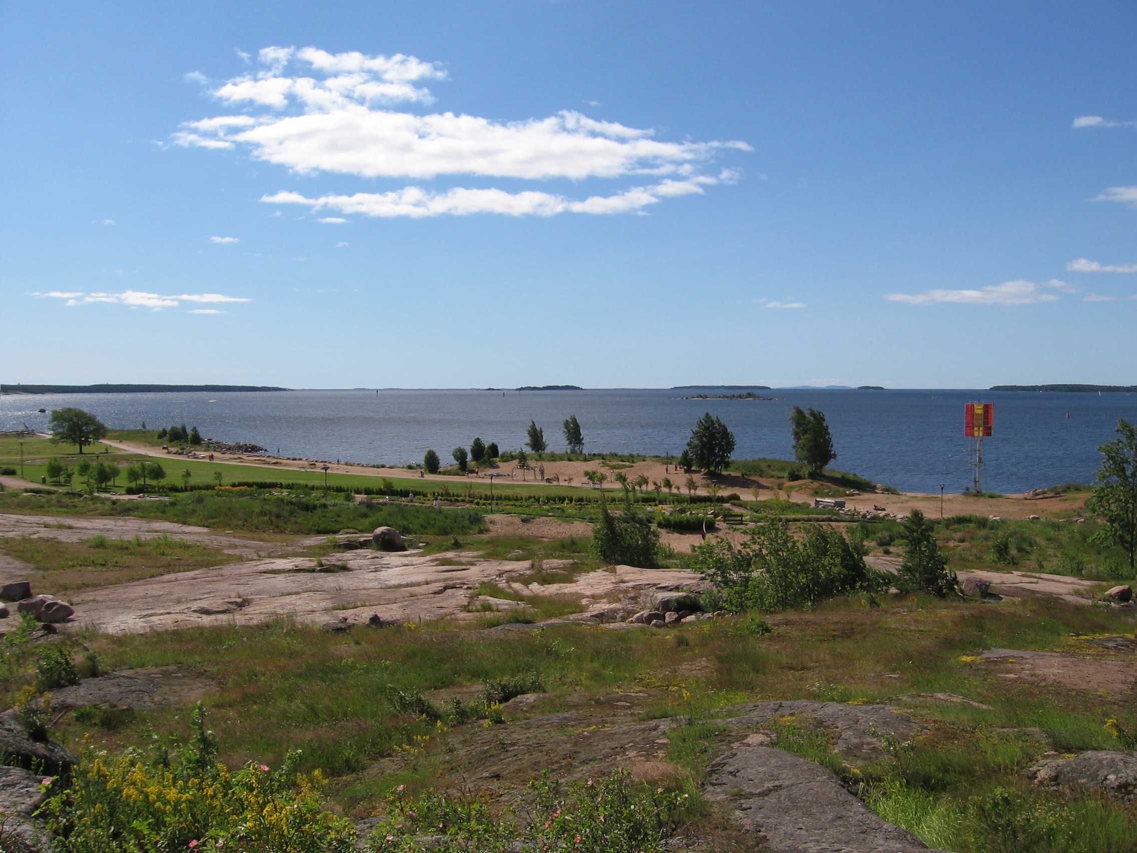 Katariinan meripuisto Kotkassa.